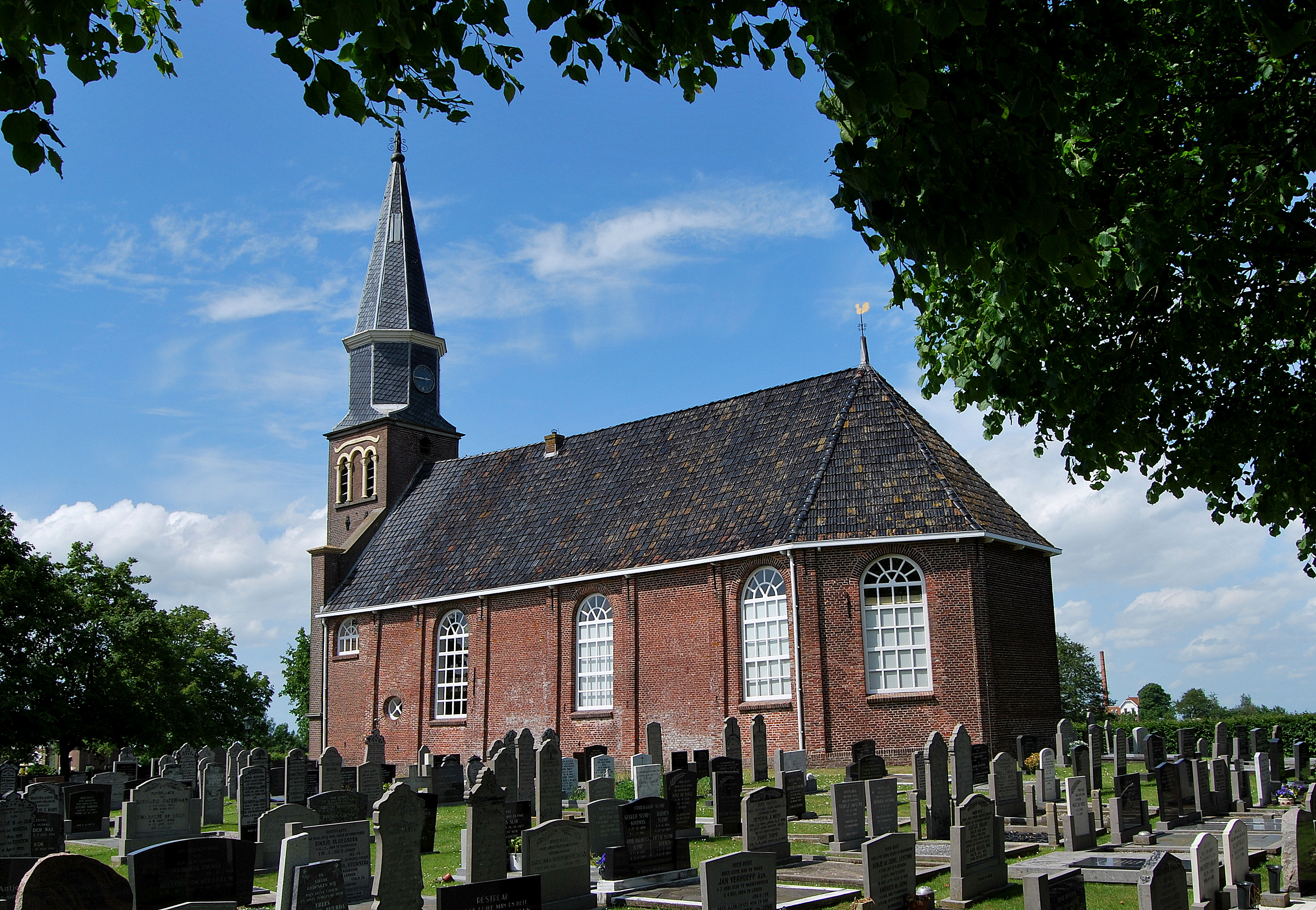 Laurentiustsjerke, Ychten